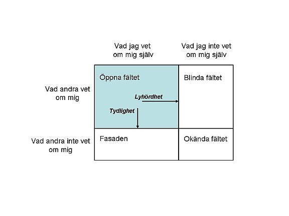 Johari fönster